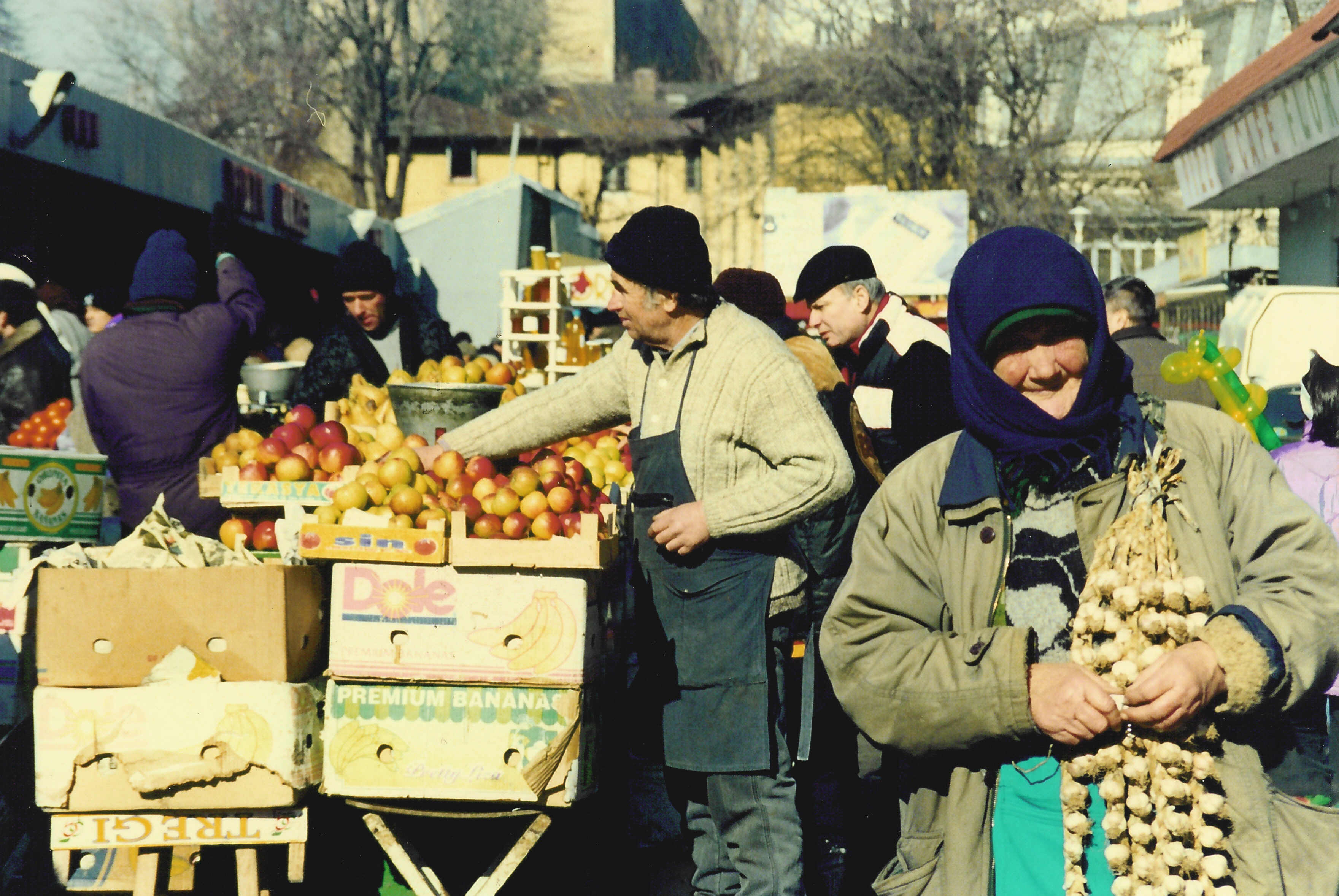 Apples and garlic for sale, Amzei Market (Piaţa Amzei), Central Bucharest, Romania.